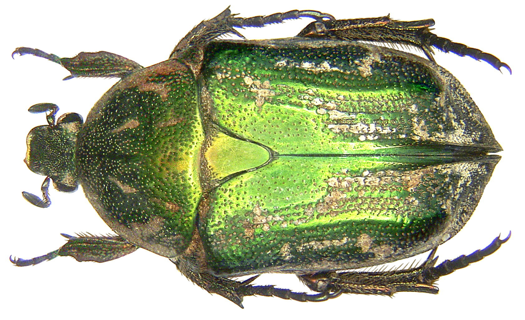 Familie: Scarabaeidae Groesse: 18-20 mm Fundort: Indonesien, Molukken, Hiri-Isl., Ternate leg. det. A.Skale, 2006 Foto: U.Schmidt, 2006